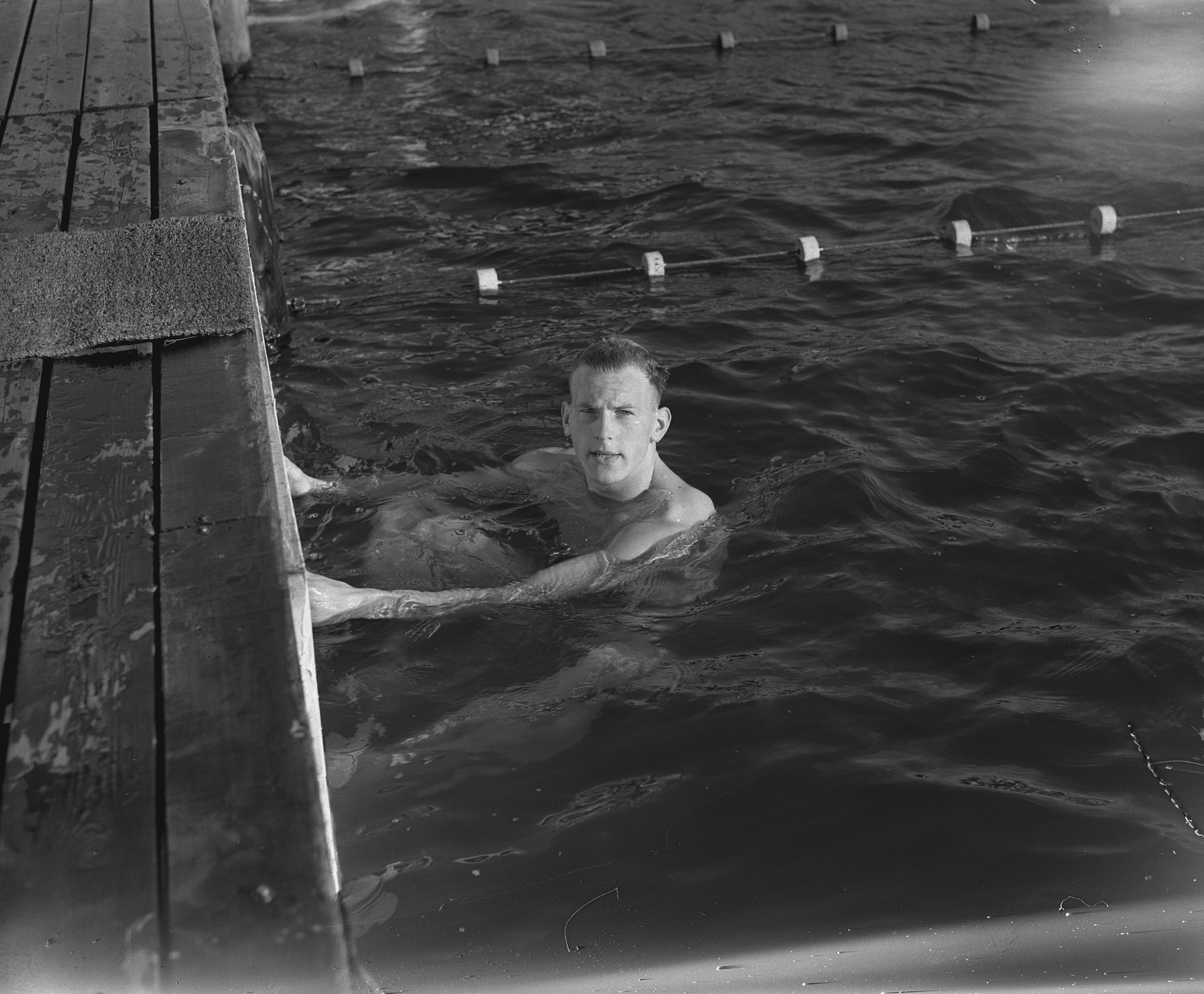 Collectie / Archief : Fotocollectie Anefo Reportage / Serie : Nationale Zwemwedstrijden te Utrecht. 1500 meter Beschrijving : Piet ten Thije kampioen bij heren Annotatie : Piet ten Thije (geb. 1934) heeft later veel betekent voor de ontwikkeling van het z.g. Masters Zwemmen bij de KNZB Datum : 8 augustus 1953 Locatie : Utrecht (stad) Trefwoorden : zwemmen Persoonsnaam : Thije, Piet ten Fotograaf : Rossem, Wim van / Anefo Auteursrechthebbende : Nationaal Archief Materiaalsoort : Glasnegatief Nummer archiefinventaris : bekijk toegang 2.24.01.09 Bestanddeelnummer : 905-8709